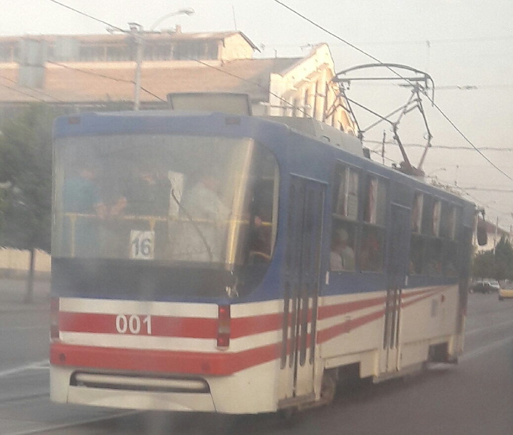 Запоріжжя, проспект Соборний. Трамвай К1 на маршруті № 16.